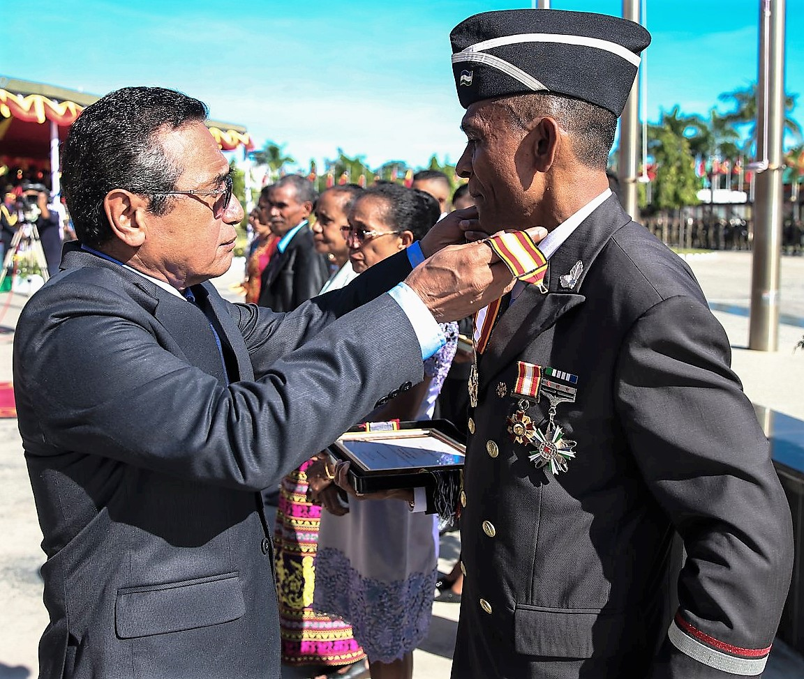 Präsident Francisco Guterres verleiht José Agostinho Sequeira den Ordem de Timor-Leste (Collar)